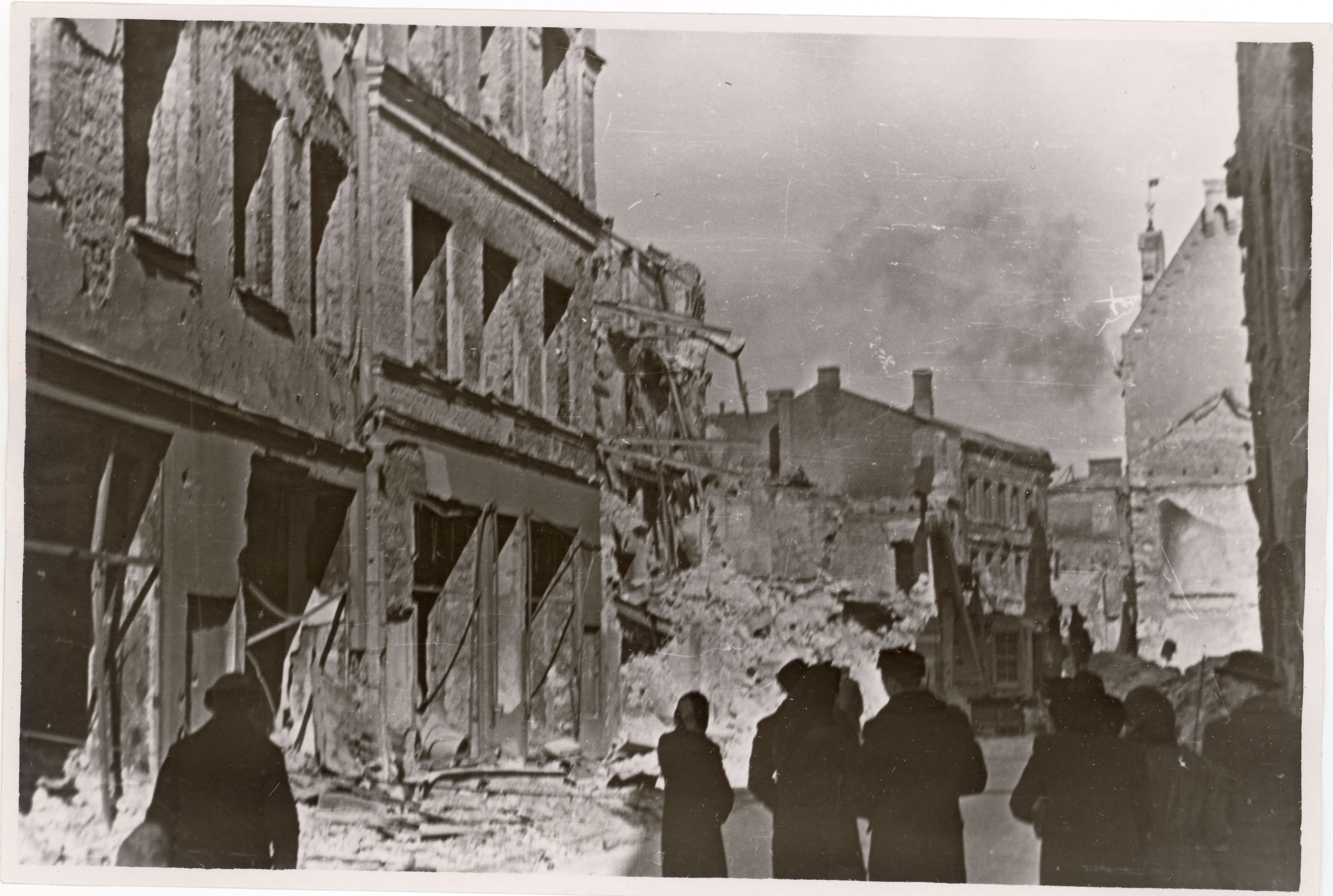 Varemetes Harju tänav, vasakul Kuld Lõvi varemed